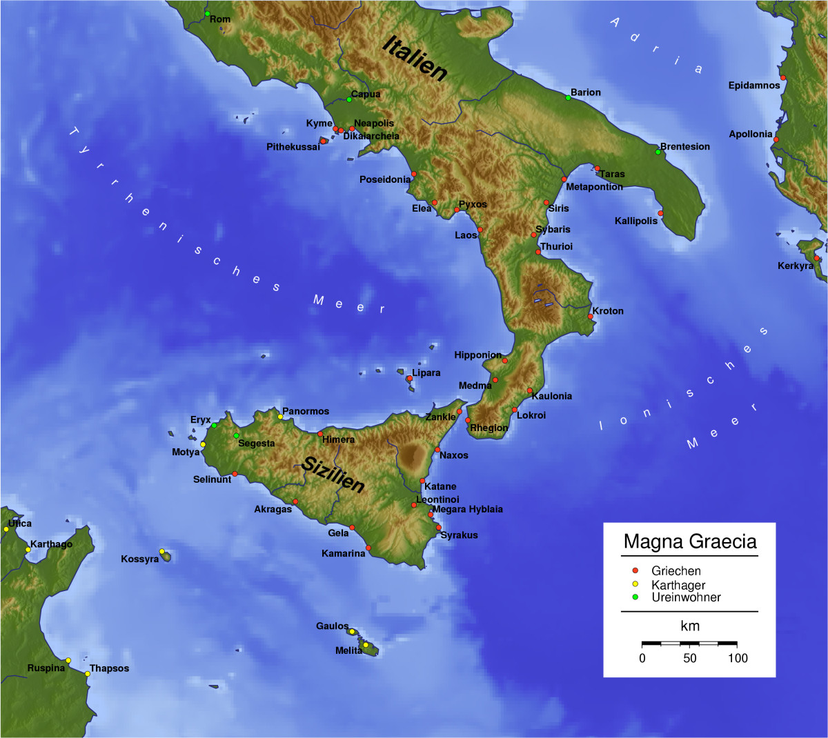 Karte von Magna Graecia